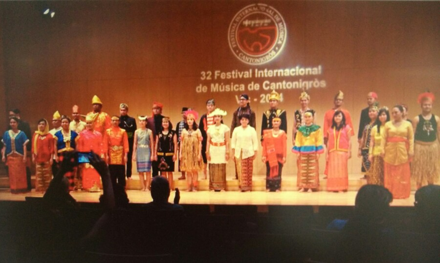 Spanyol 2014